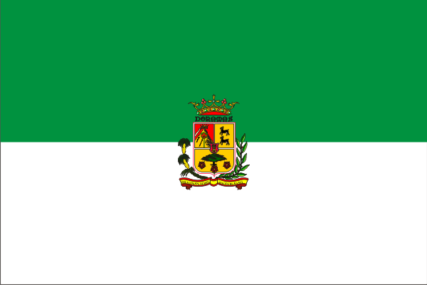 Bandera de Moya (Las Palmas, España)